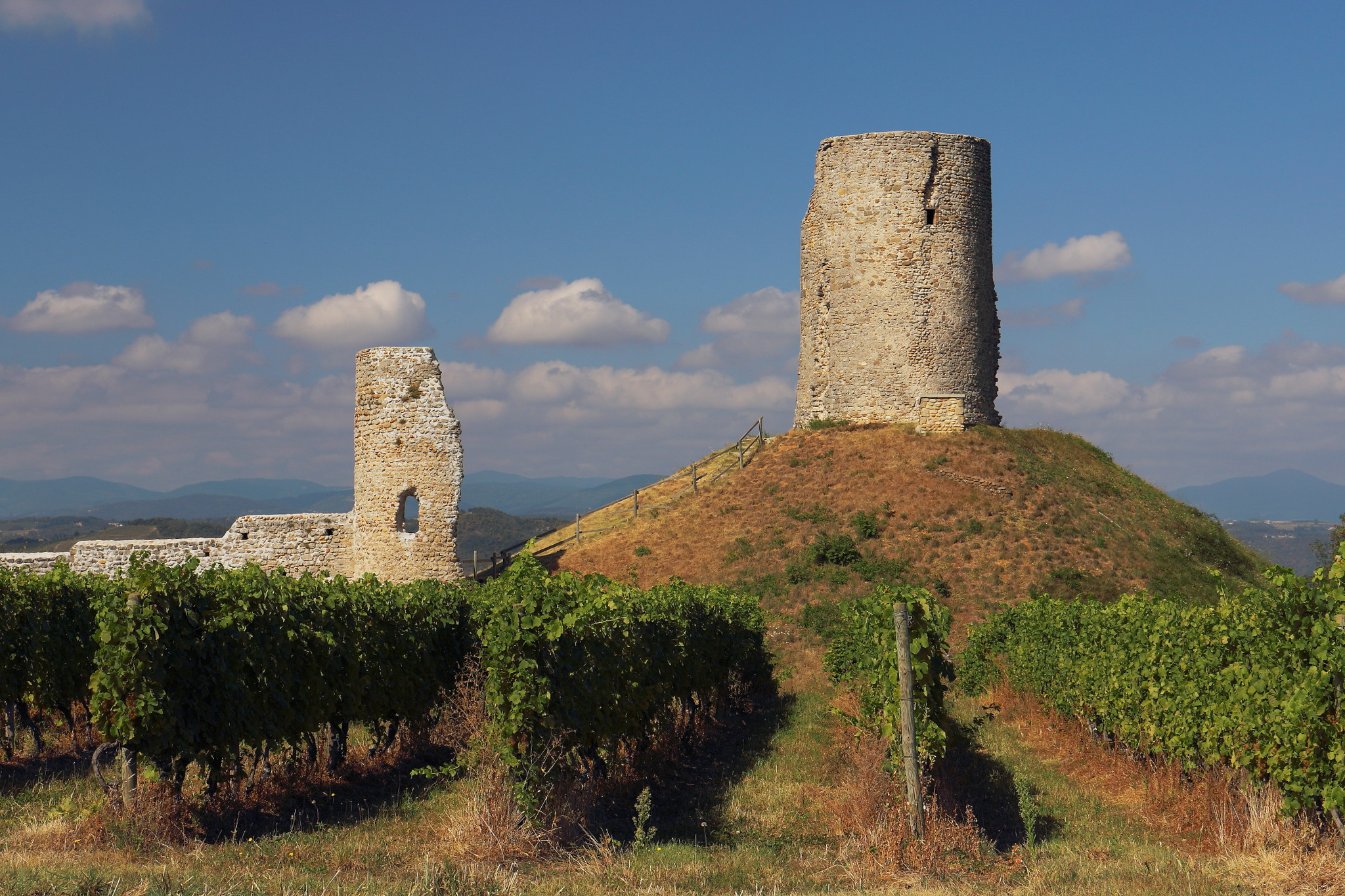 Ruines du château de Mercurol